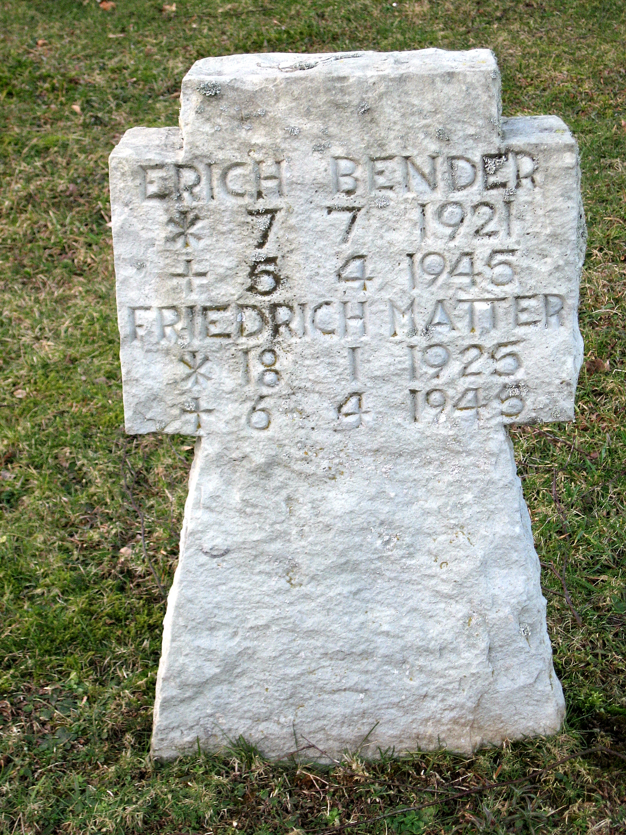 Meschede, Eversberg, Kriegsgräberstättte